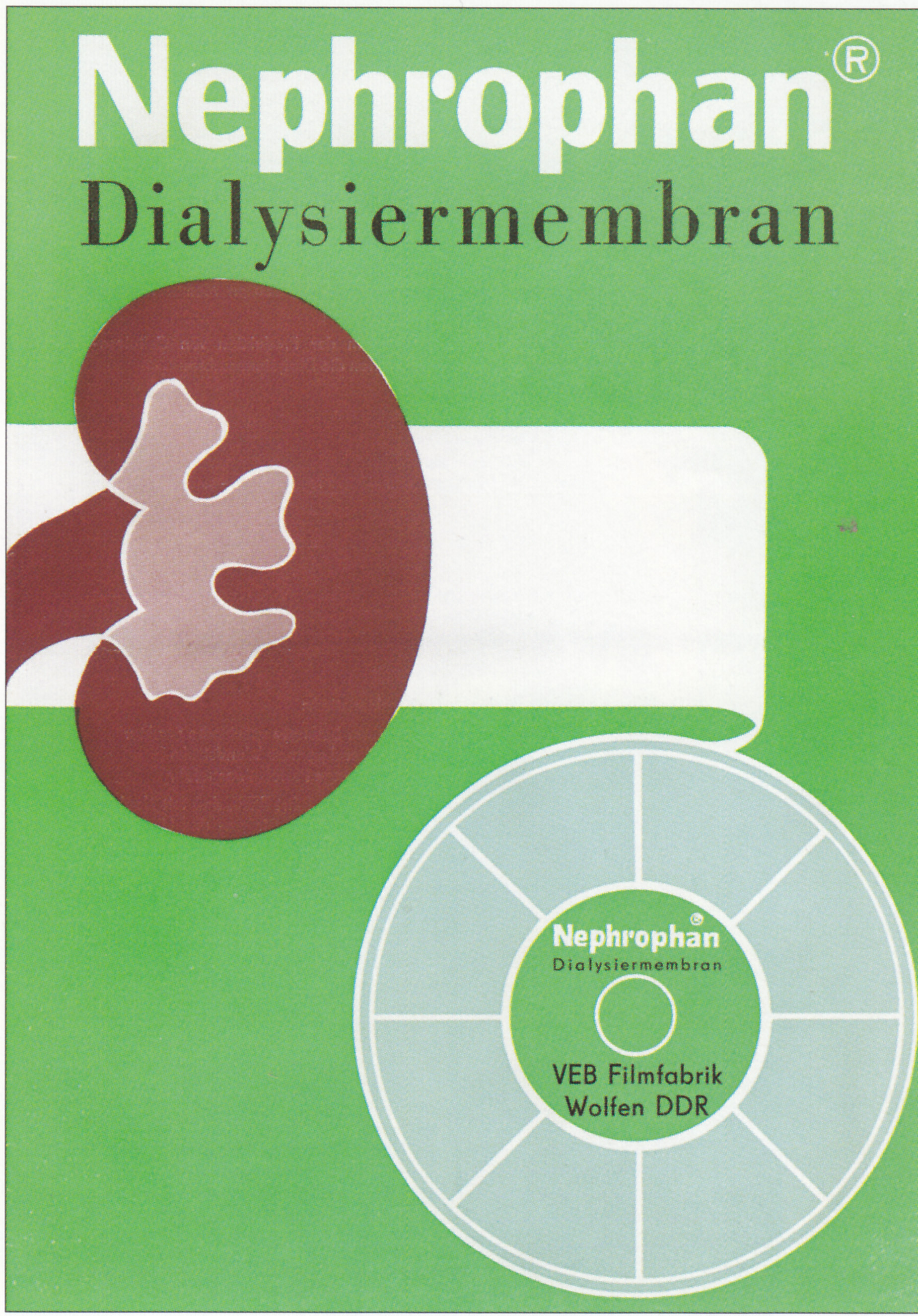 1967/68 nahm die Filmfabrik Wolfen die Fertigung einer Dialysiermembran für Dialysegeräte mit Schlauchprinzip auf.